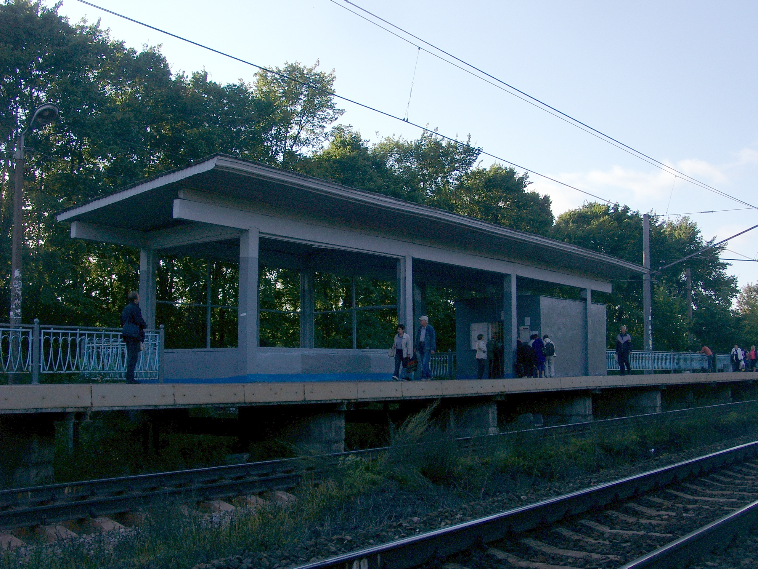 Платформа 67 км Приозерского направления, Ленинградская область, Россия. Навес и билетная касса на платформе в сторону Санкт-Петербурга